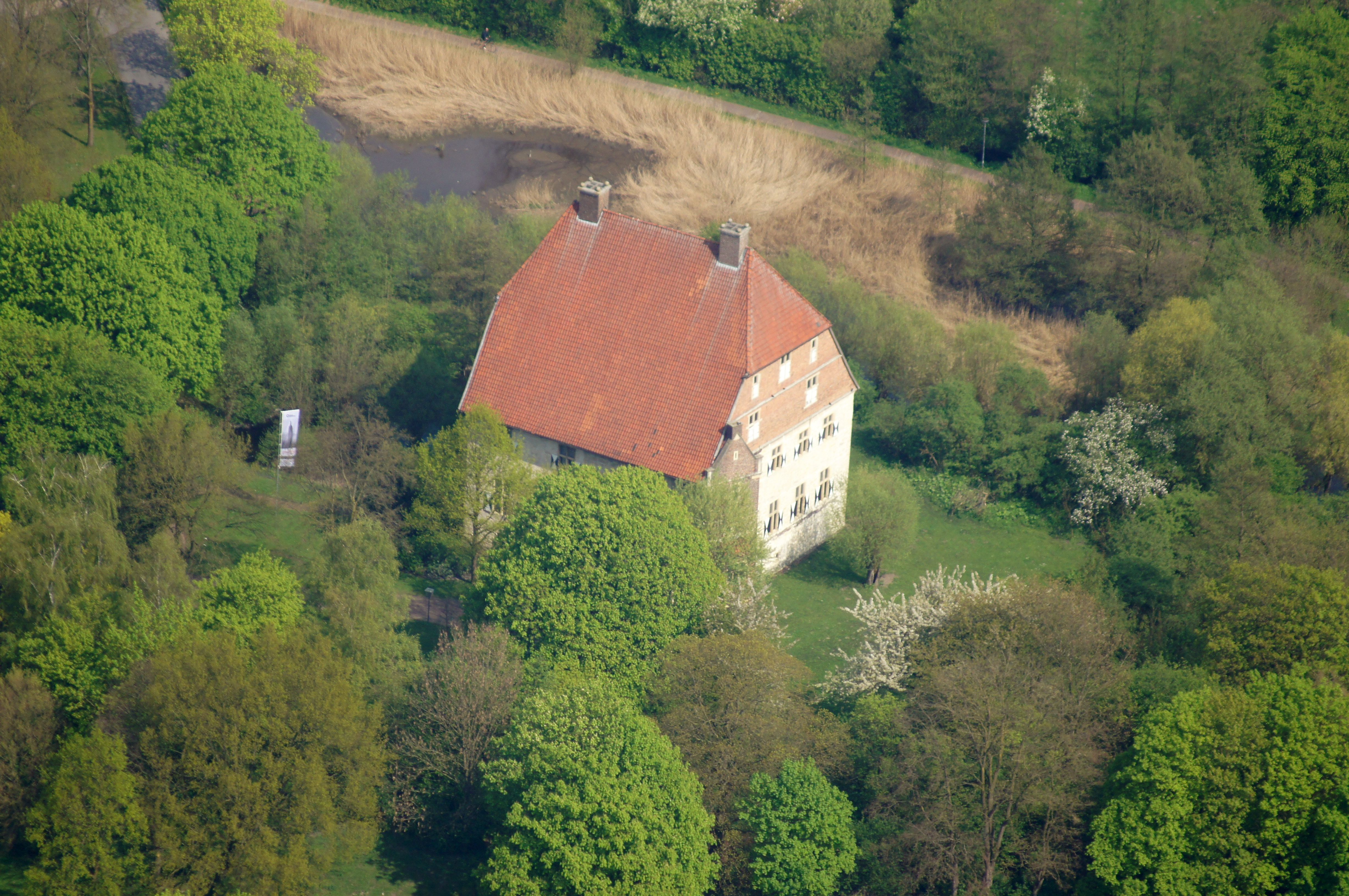 Die Aufnahme entstand während des Münsterland-Fotoflugs am 12. April 2014.